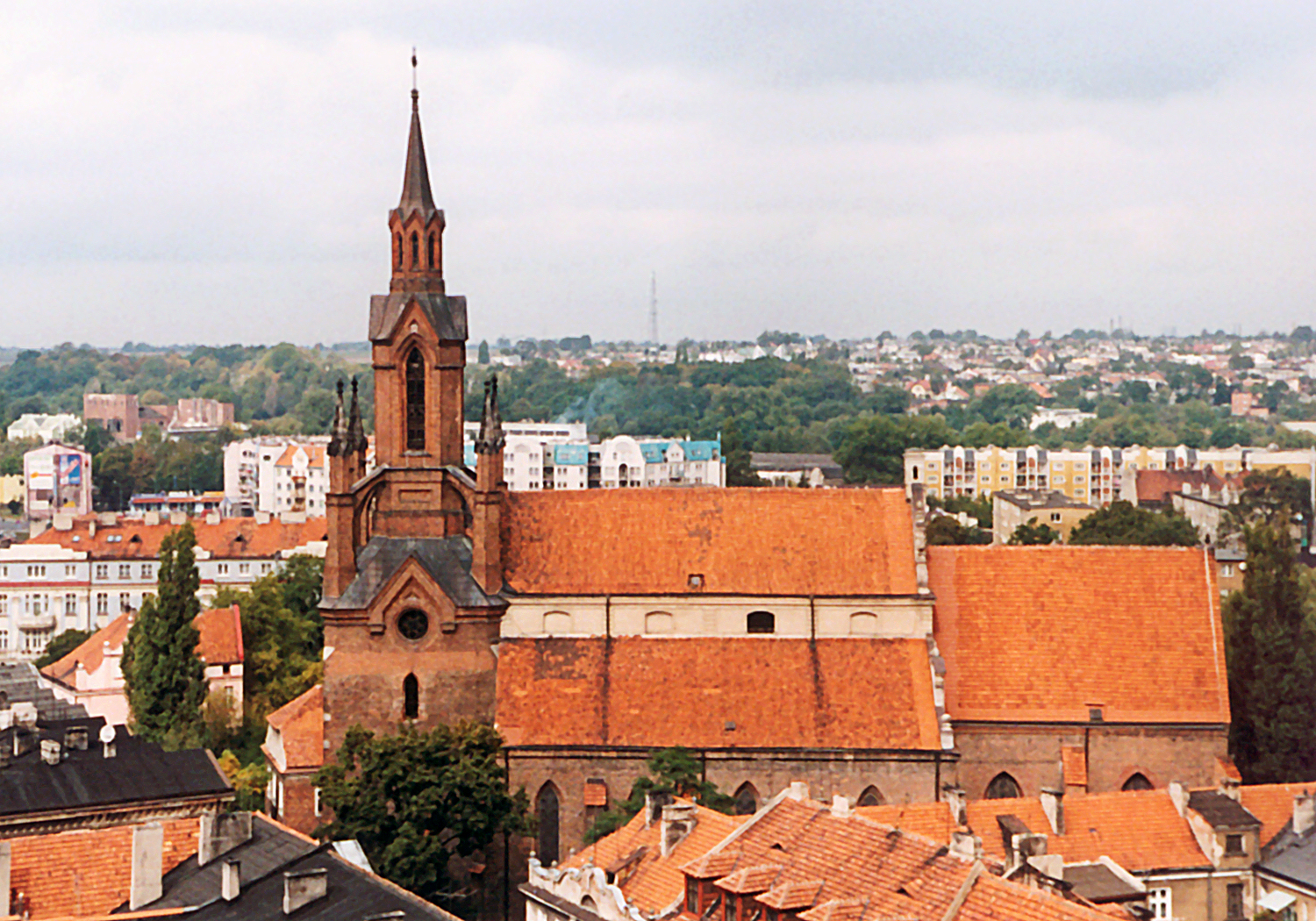 Kalisz, zespół klasztorny kanoników laterańskich; katedra pw. św. Mikołaja